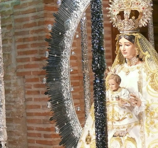 foto de la patrona de miguelturra